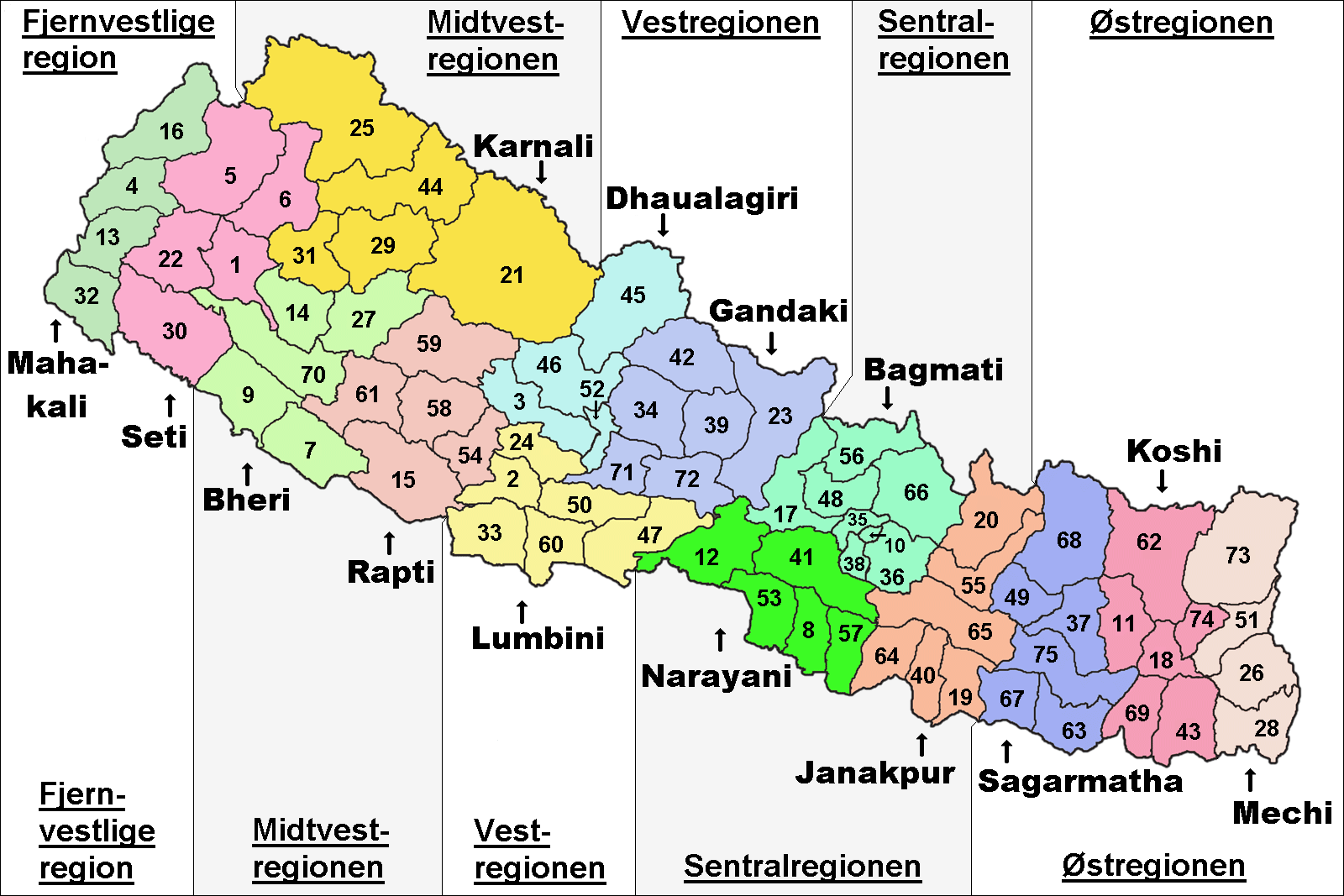 FrenchCarte des subdivisions du Népal (wp-FR) : 5 régions de développement, 14 zones et 75 districts. Noms des régions en norvégien. EnglishMap of subdivisions of Nepal: 5 development regions, 14 zones and 75 districts. Regions names in Norwegian.